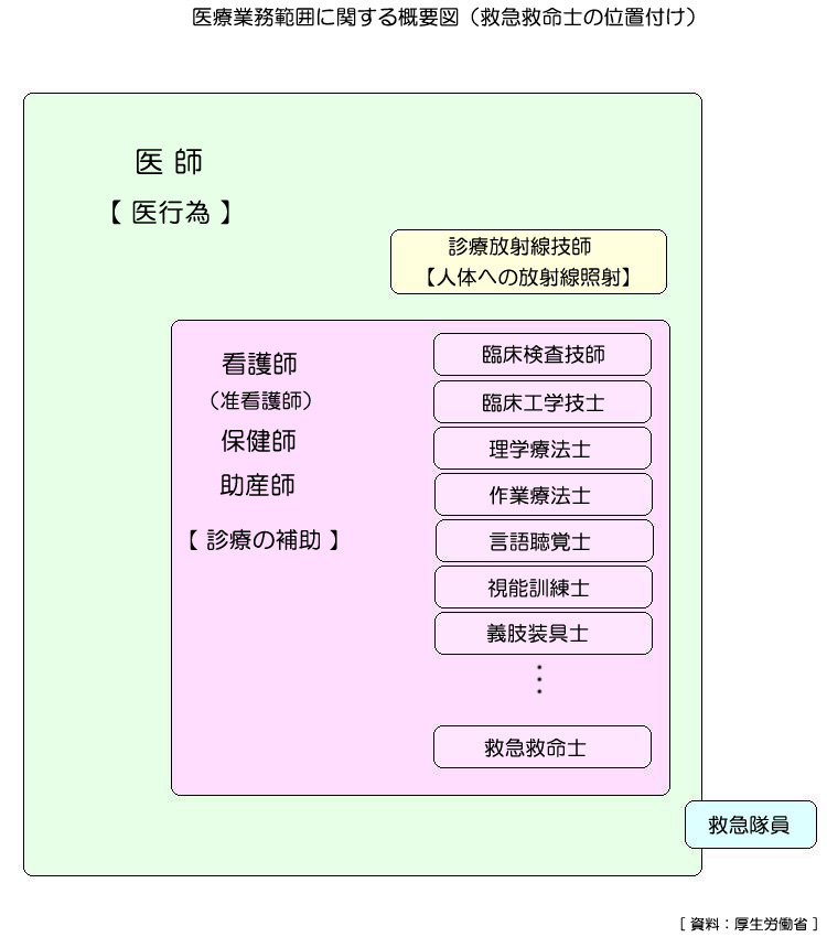 救急急飯の業務範囲 概念図